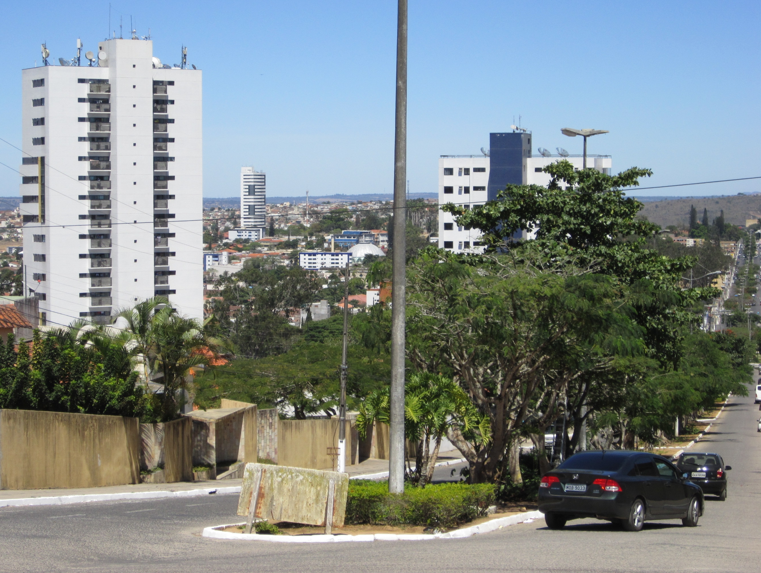 Bairro de Heliópolis - Garanhuns, Pernambuco, Brasil